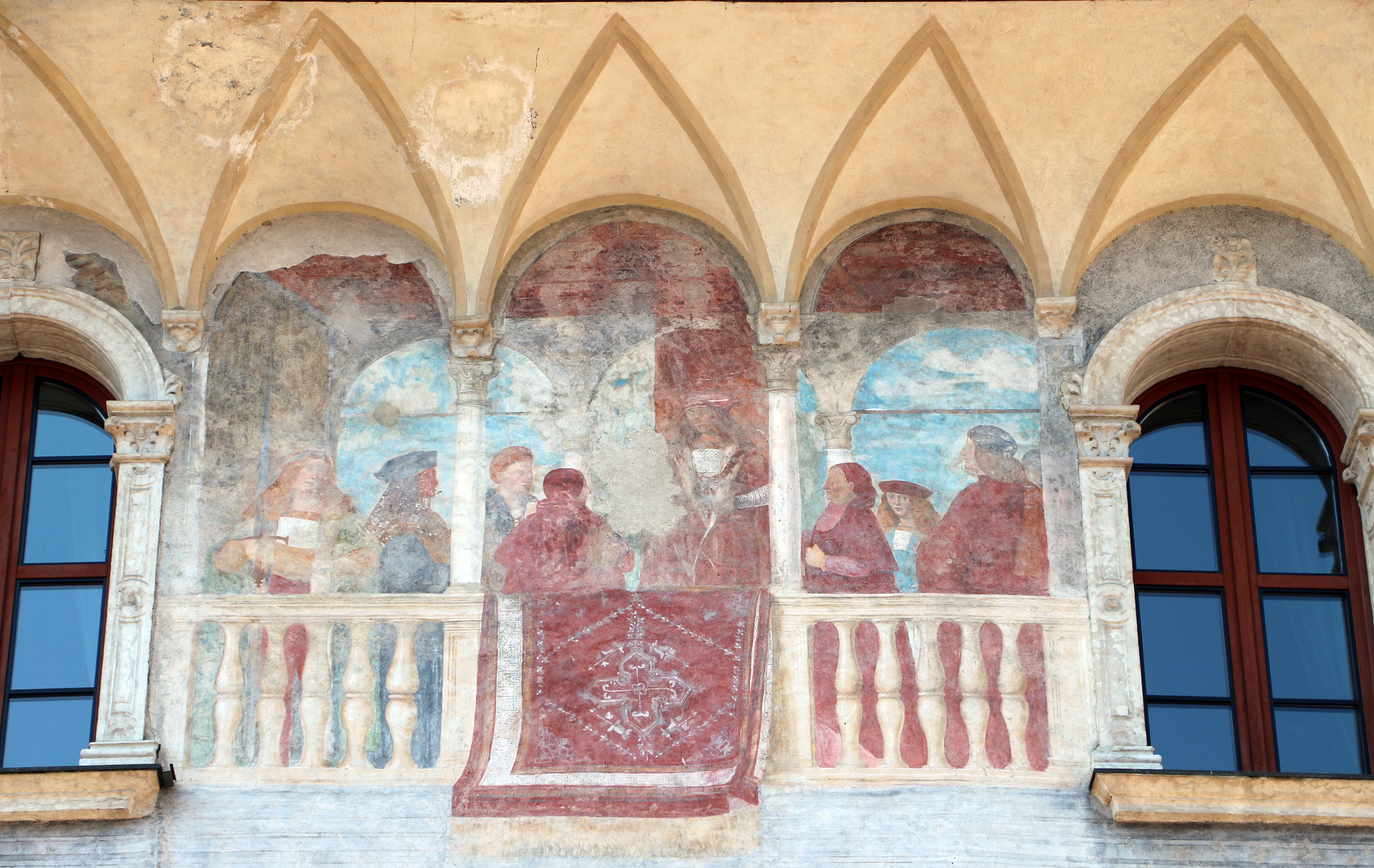 Palazzo Geremia This is a photo of a monument which is part of cultural heritage of Italy.